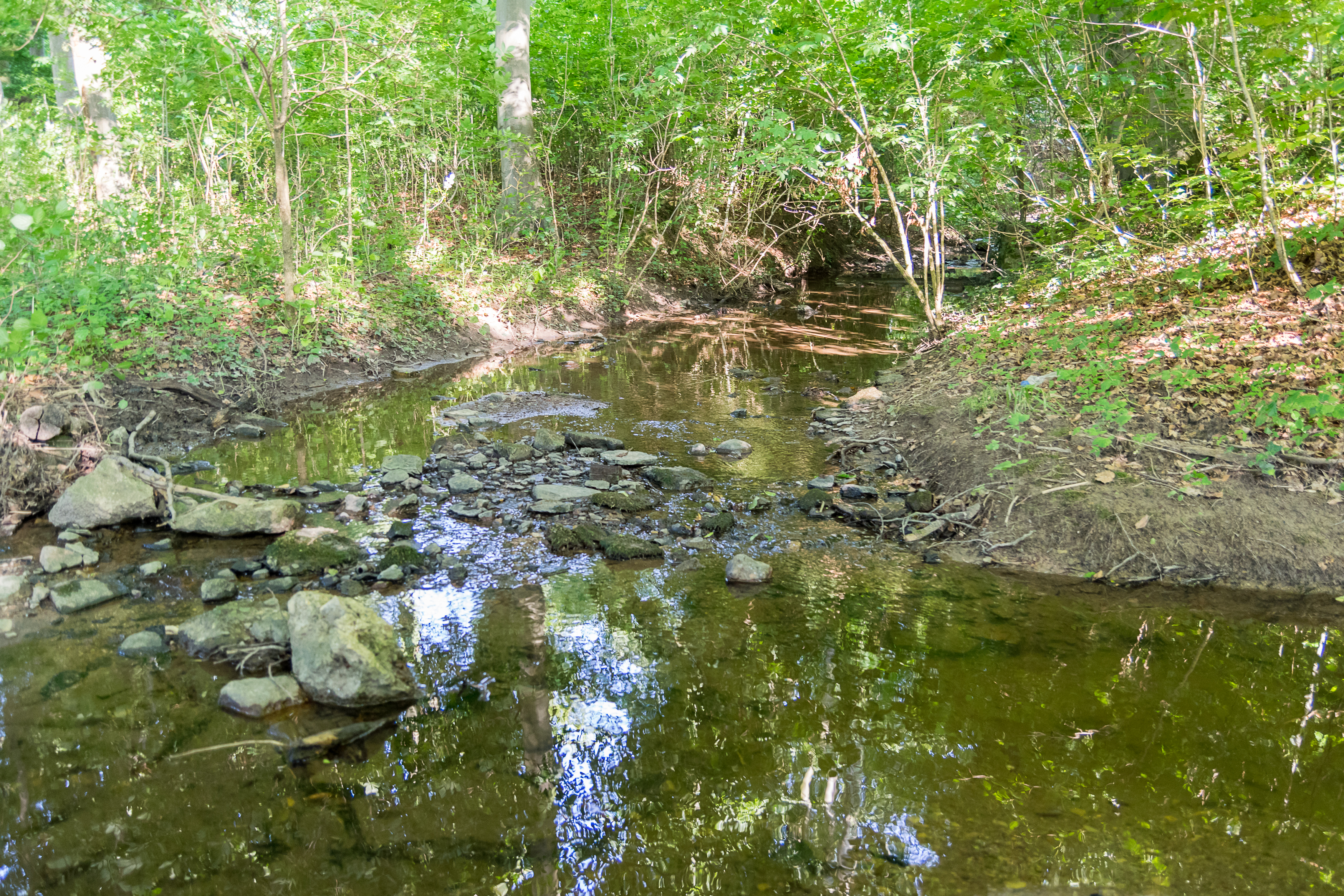 Naturschutzgebiet Glimketal, Bad Salzuflen, Kreis Lippe